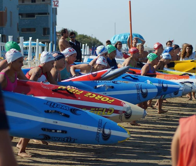 Partenza della gara con tavola femminile